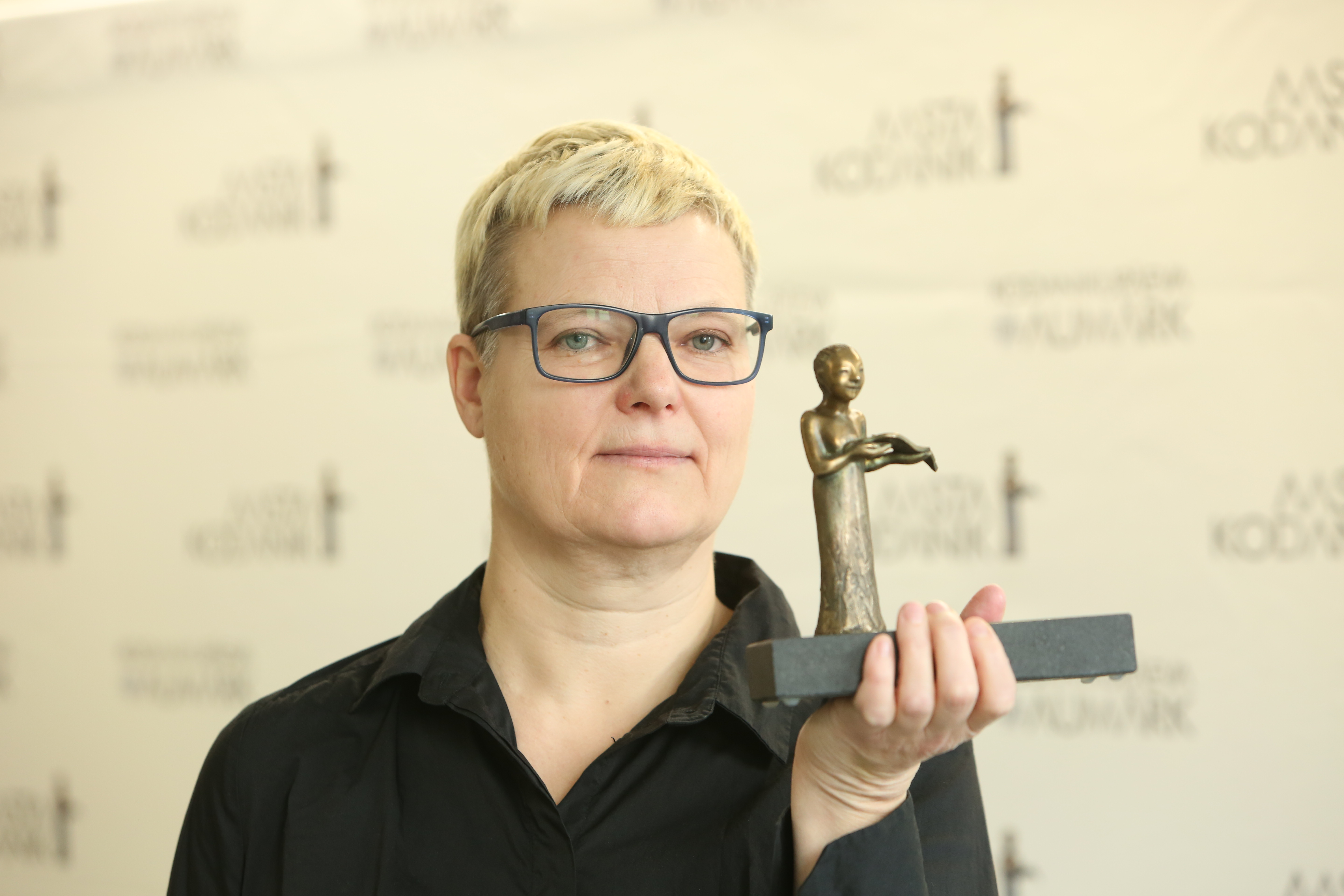 Riina Roose, kodanikupäeva tänuüritus